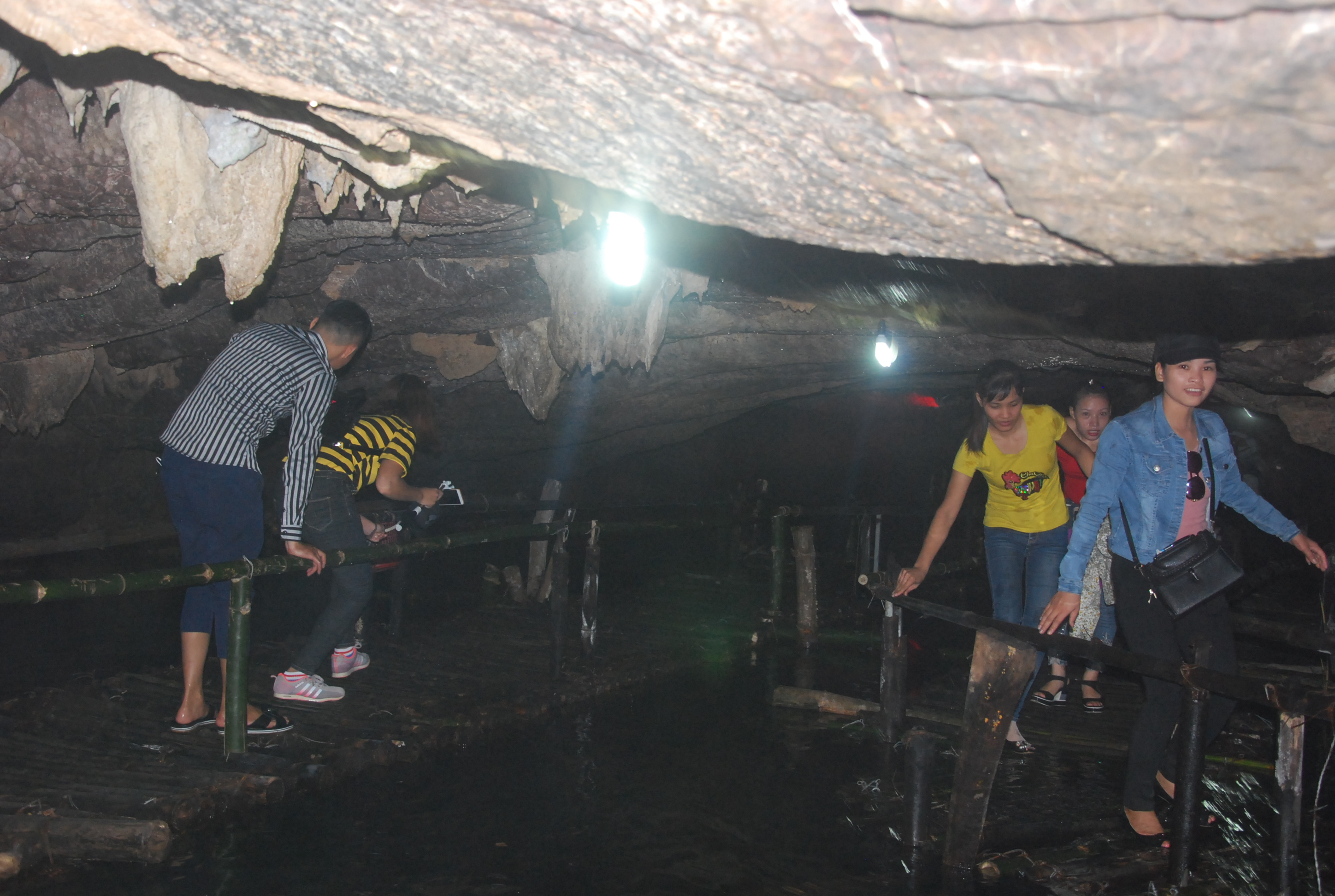 Động Tiên Cá thuộc Thung Nham trong Quần thể di sản thế giới Tràng An